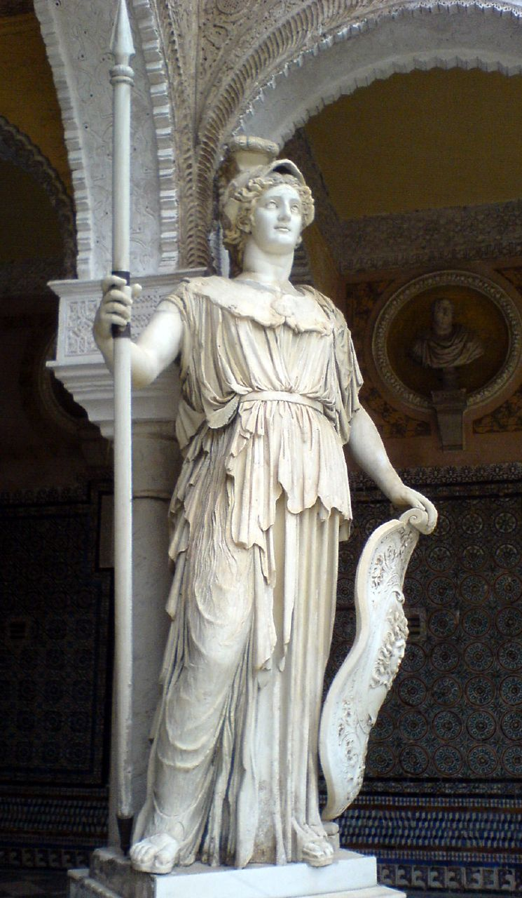 Estatua romana de la diosa Atenea en el patio principal de la Casa de Pilatos, (Sevilla, Andalucía, España)